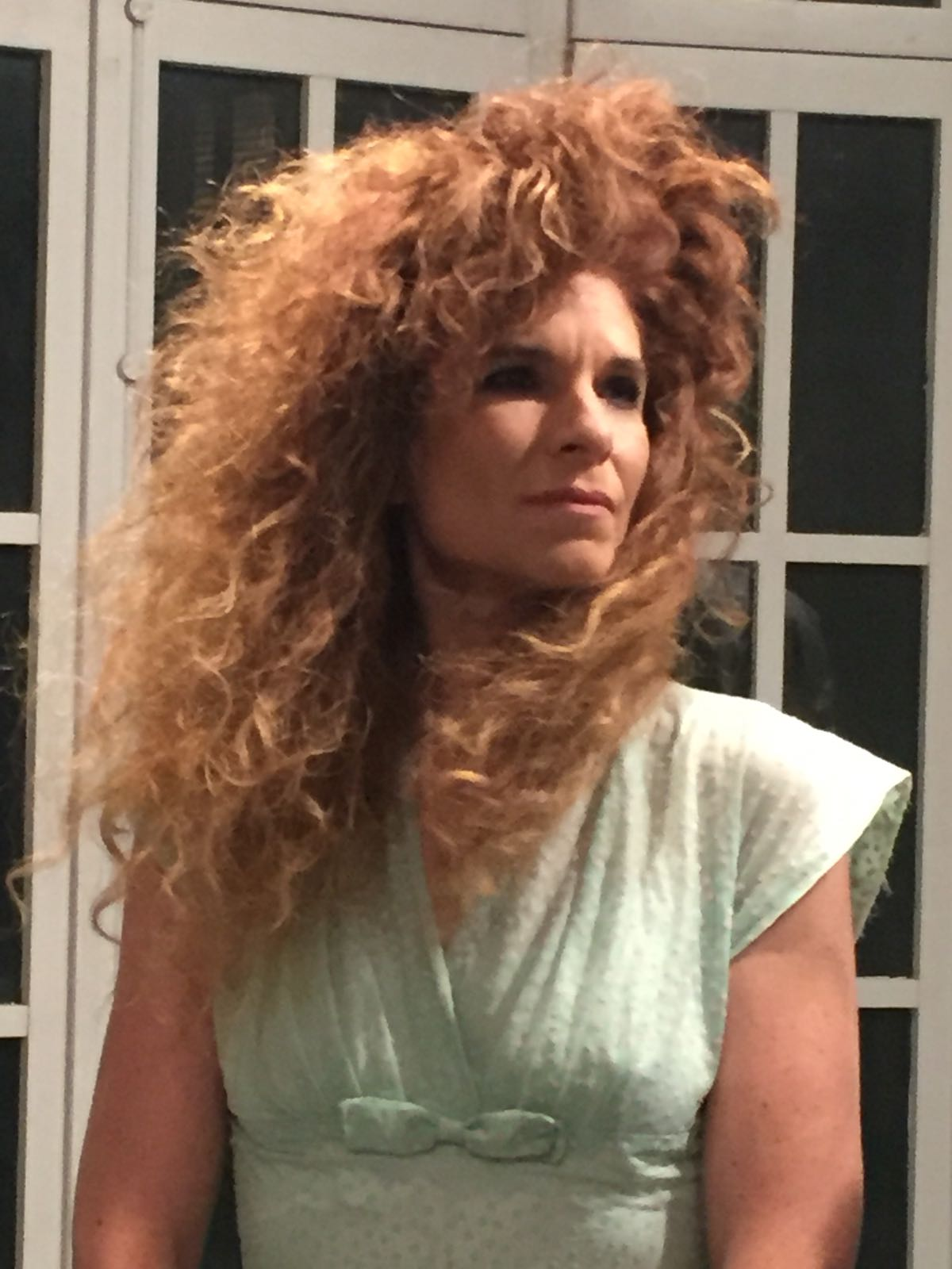 רויטל בן-אשר פרץ בפרויקט "פרוטקטיב אדג'" בגלריית שלוש